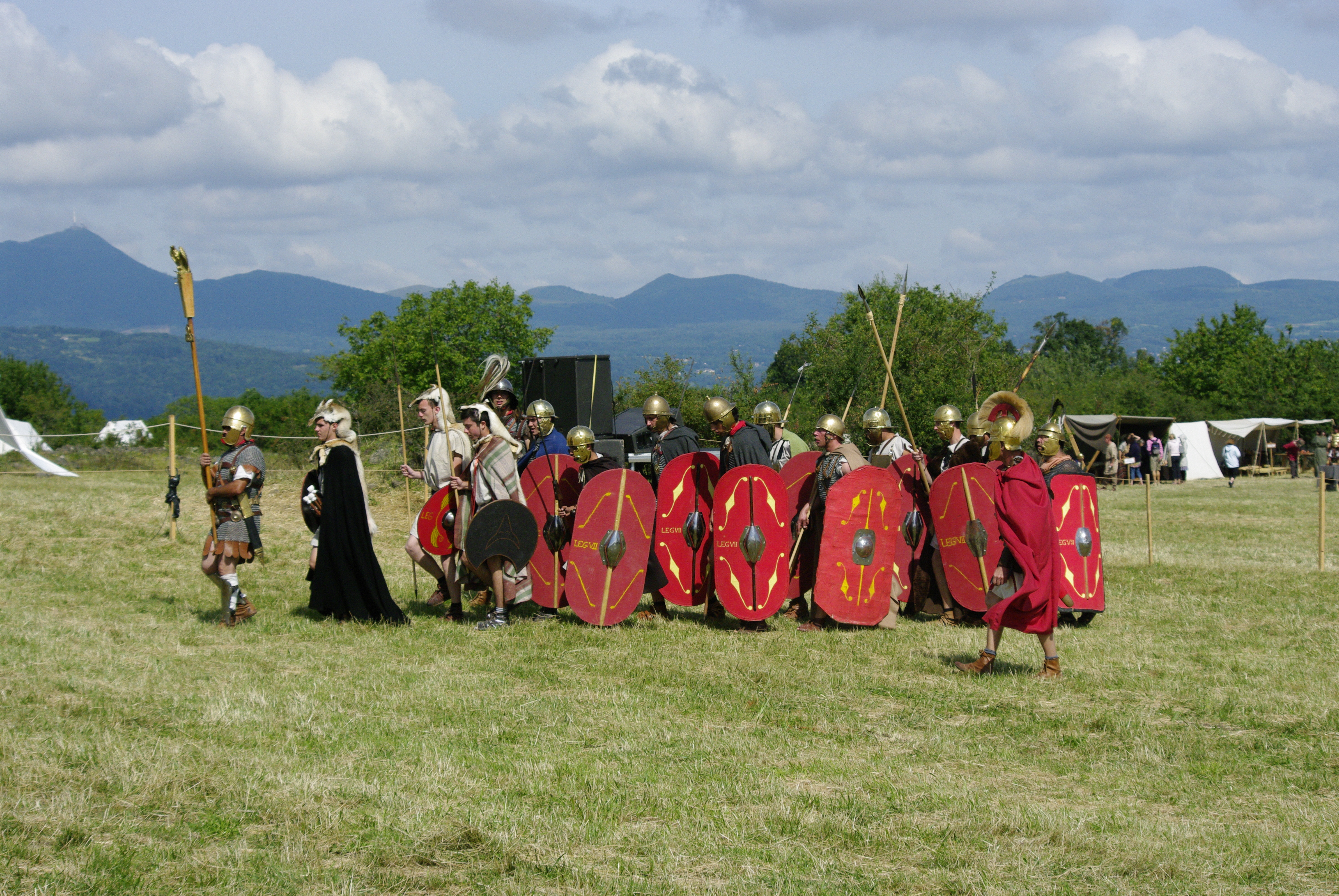 Groupe de légionnaires de l'époque de la guerre des Gaules. Photographie réalisée le 22 juillet 2012 sur le plateau de Gergovie lors des Arverniales.